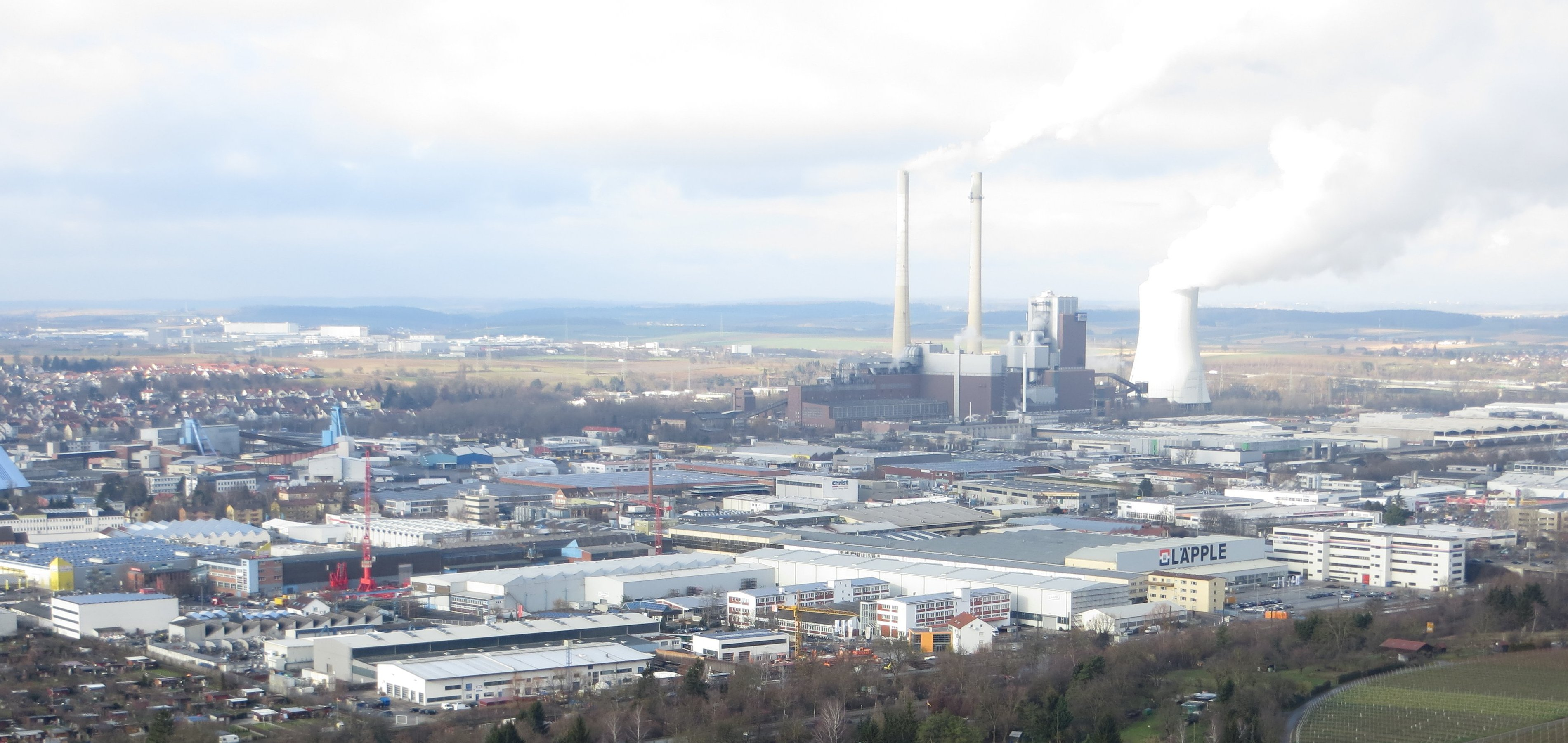 Der Unternehmenssitz der Läpple AG (im Vordergrund) im Heilbronner Industriegebiet